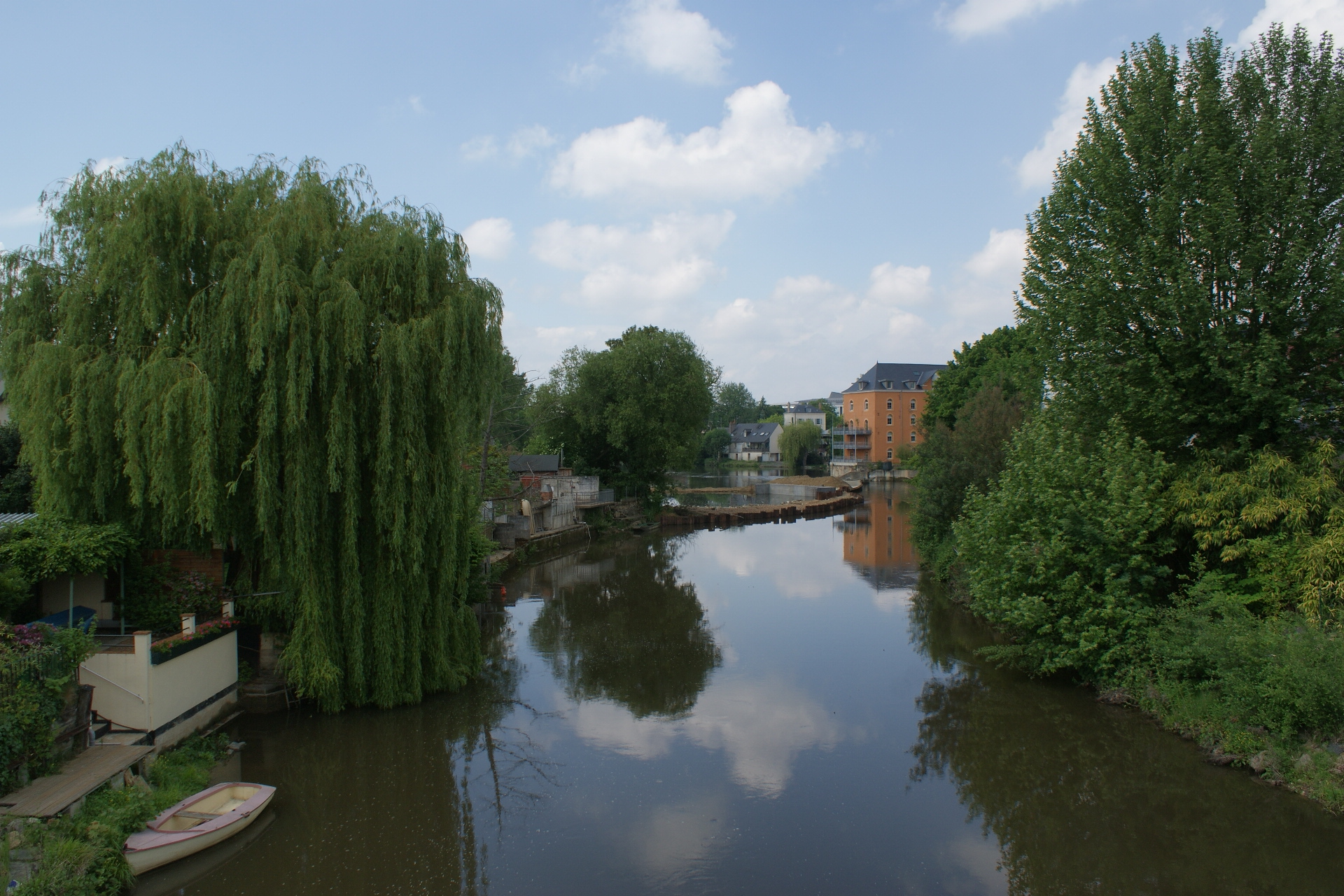 Le gué de Maulny dans le quartier Gare Sud du Mans.